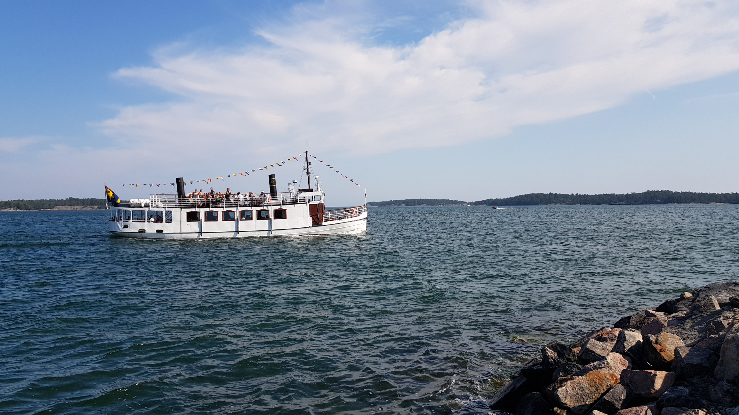 M/S Ellen af Harstena vid Fyrudden